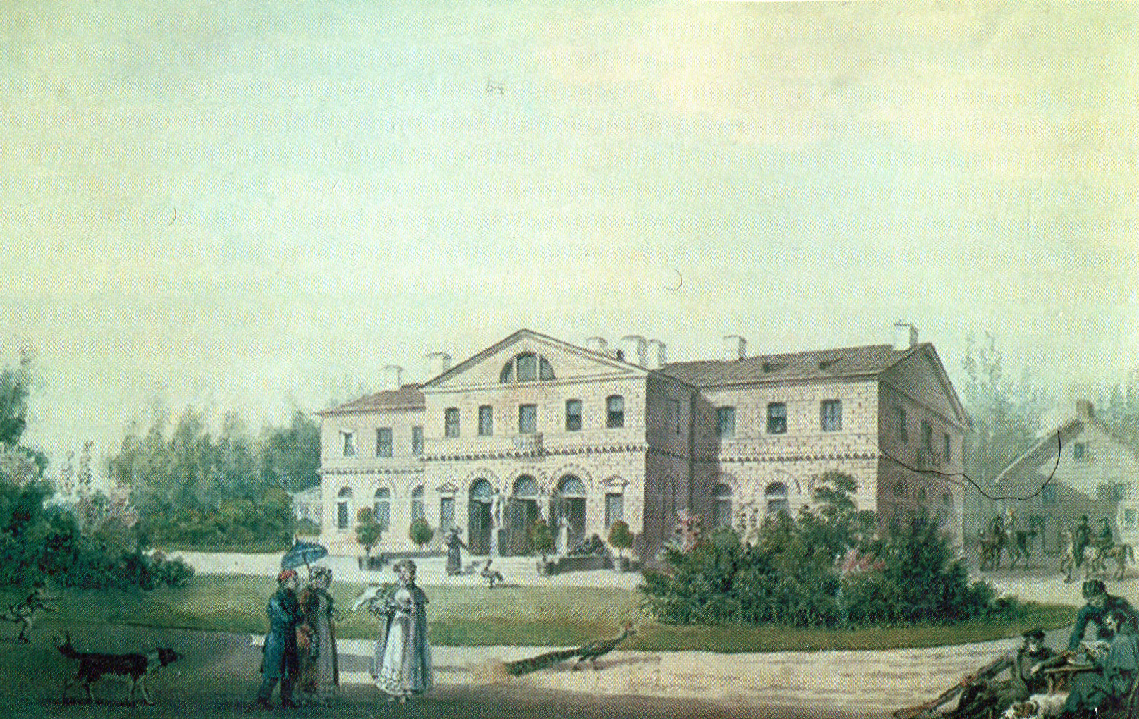 Приютино